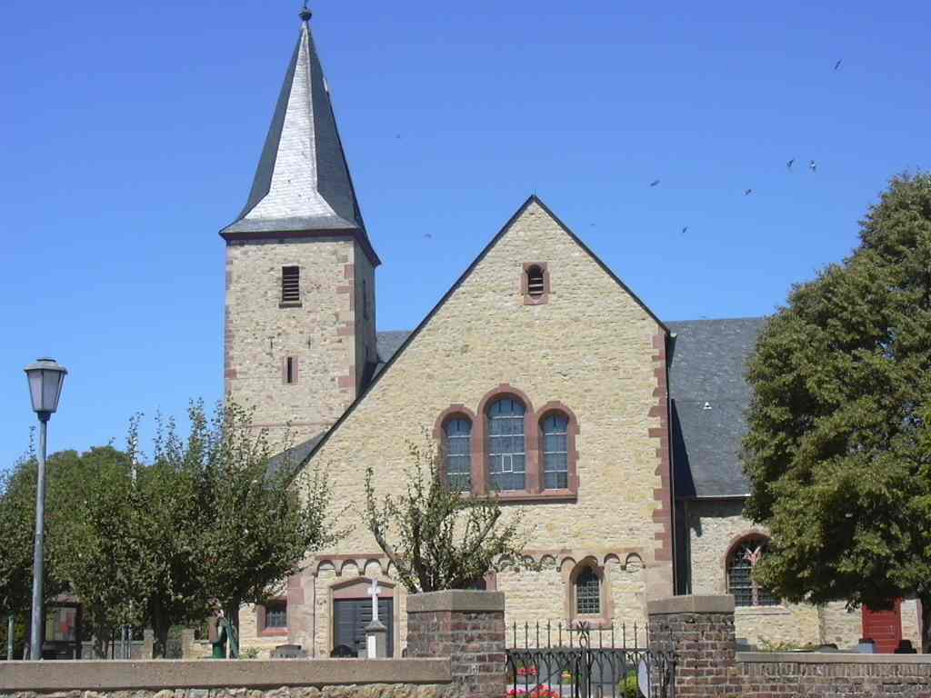 Katholische Pfarrkirche St. Agnes, Lövenich bei Zülpich